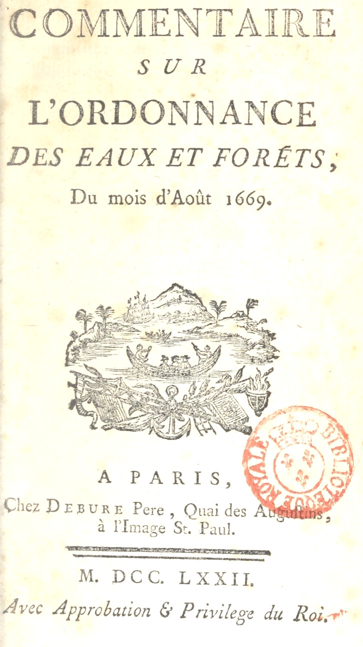 Daniel Jousse, Commentaire sur l'Ordonnance des Eaux et forêts, du mois d'août 1669, 1772.